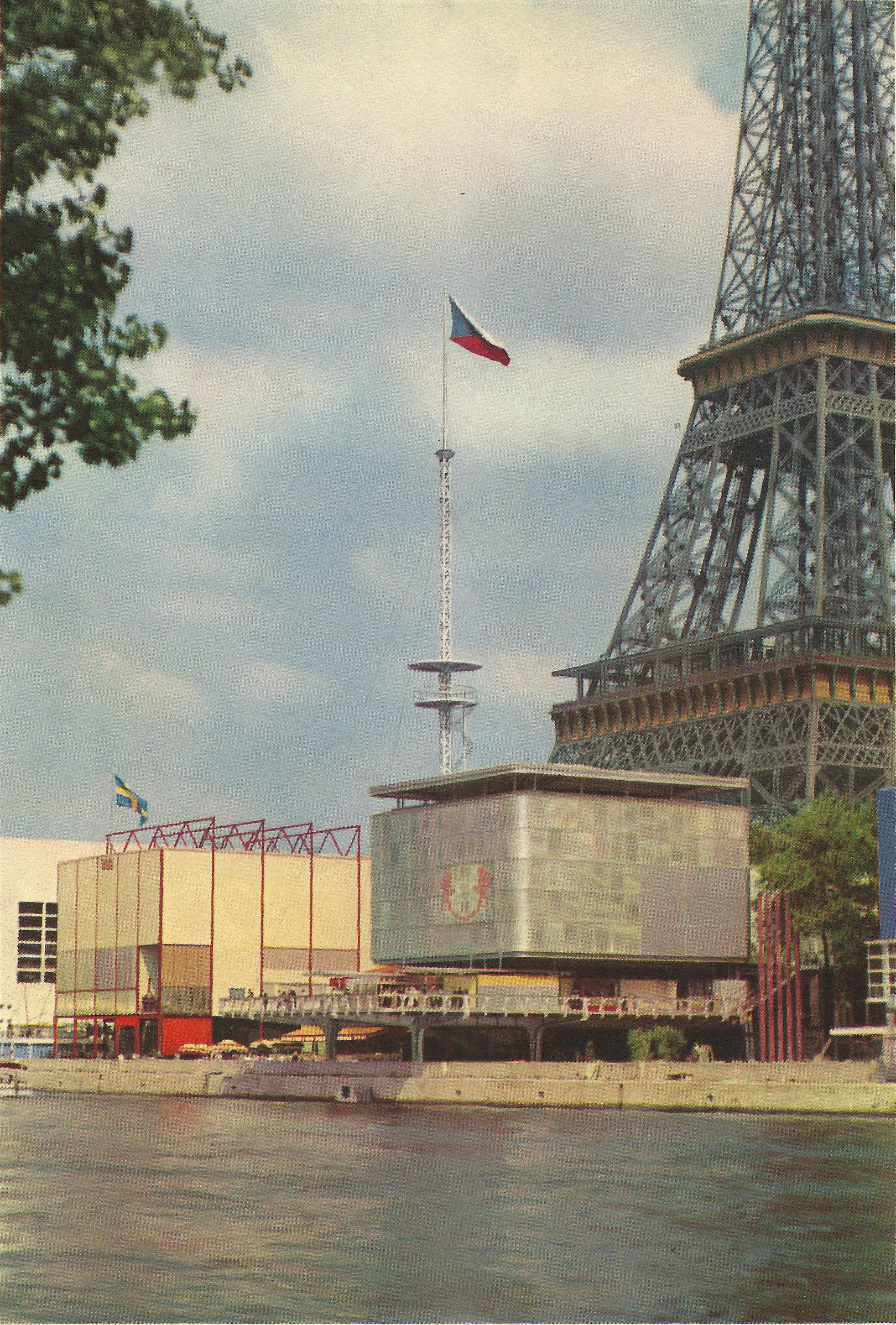 Exposition Internationale des Arts et Techniques dans la Vie Moderne (Paris-1937) , les pavillons de la Tchéchoslovaquie et de la Suède.